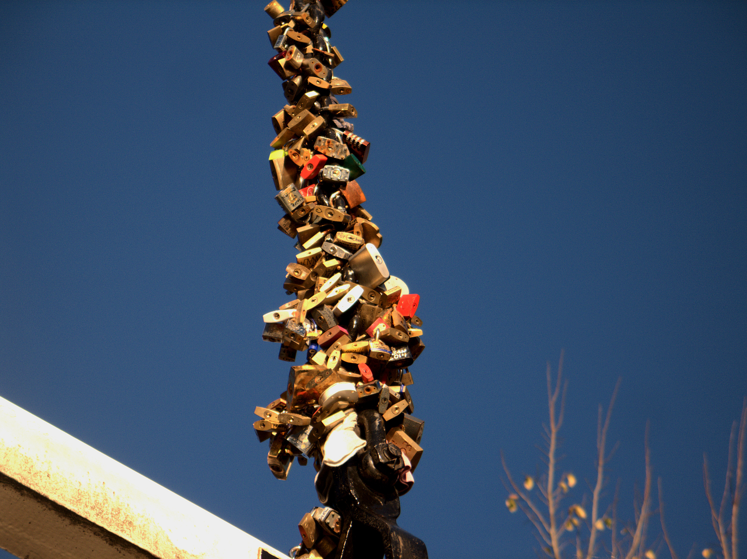 Een van de tuidraden van de Staalmeestersbrug (brug 227) met liefdeslotjes.